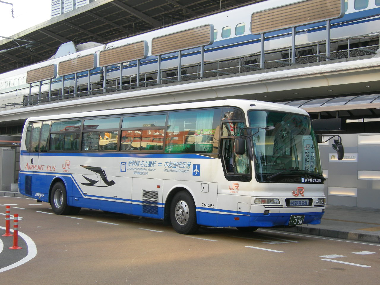 JR東海バス 中部国際空港線（三菱KC-MS829P）